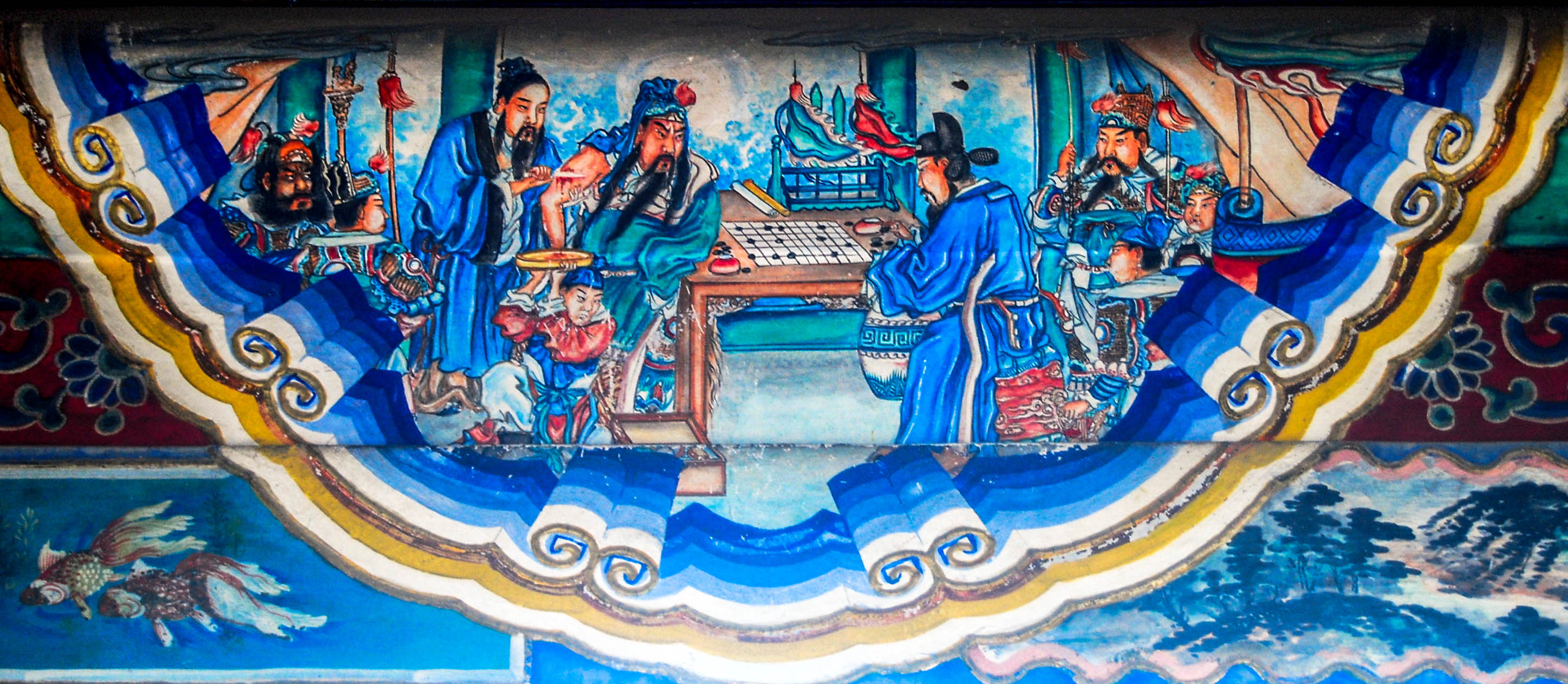 Quan Vũ cạo xương chữa độc - Di Hòa Viên